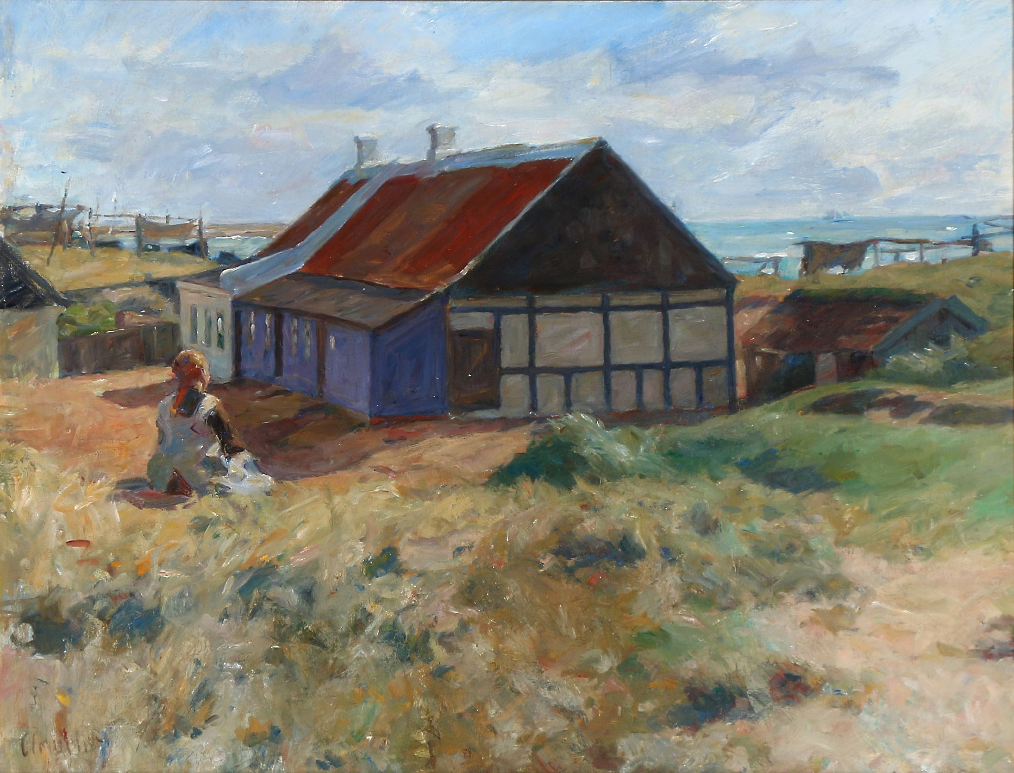 En pige i klitterne spejder udover havet ved Skagen